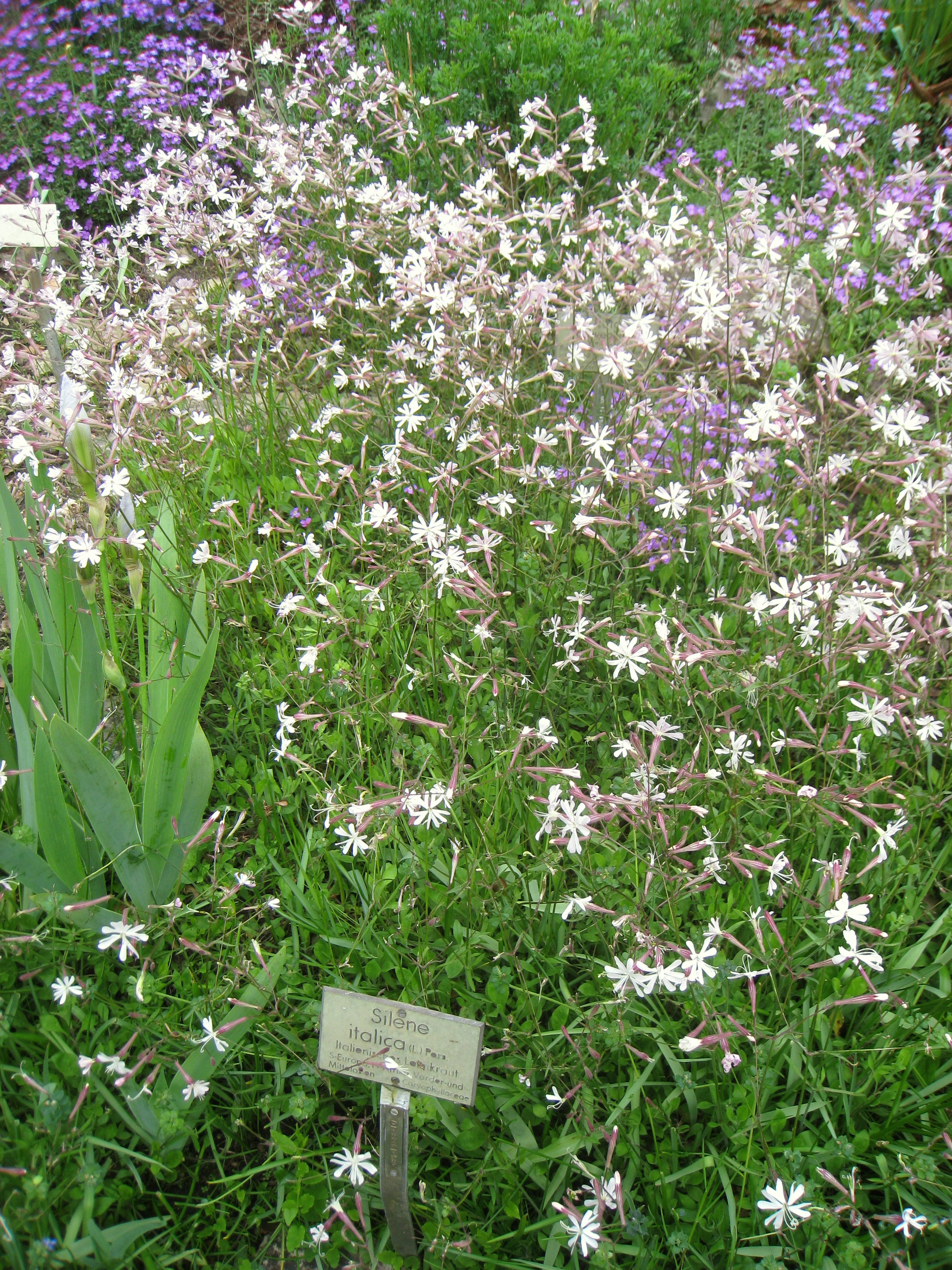 Silene italica specimen, in the Botanischer Garten, Berlin-Dahlem (Berlin Botanical Garden), Berlin, Germany.